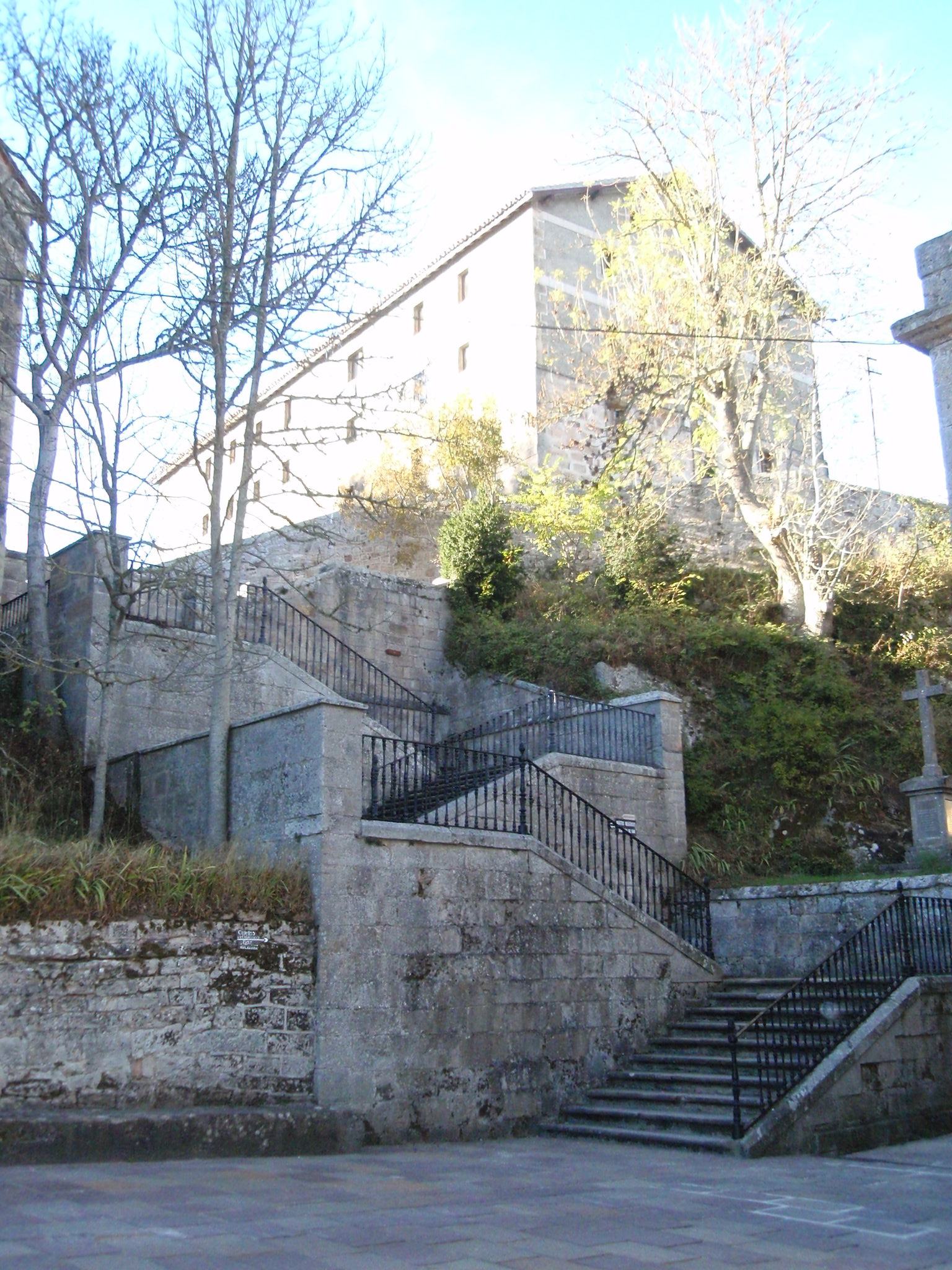 Vista de las escaleras, y la parte superior del Monasterio de Montesclaros